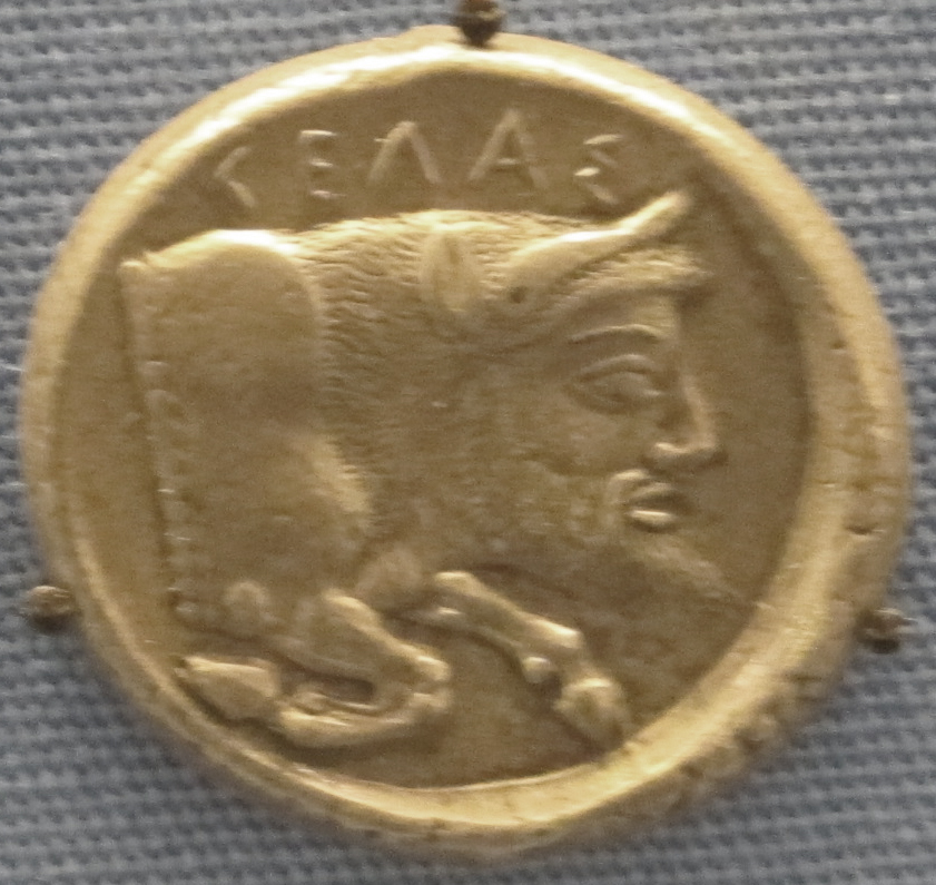 didracma con toro